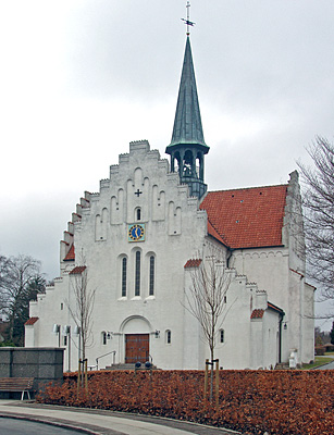 Åbyhøj Kirke, Åby Sogn, Århus Kommune, Hasle Herred, Århus Amt, Denmark